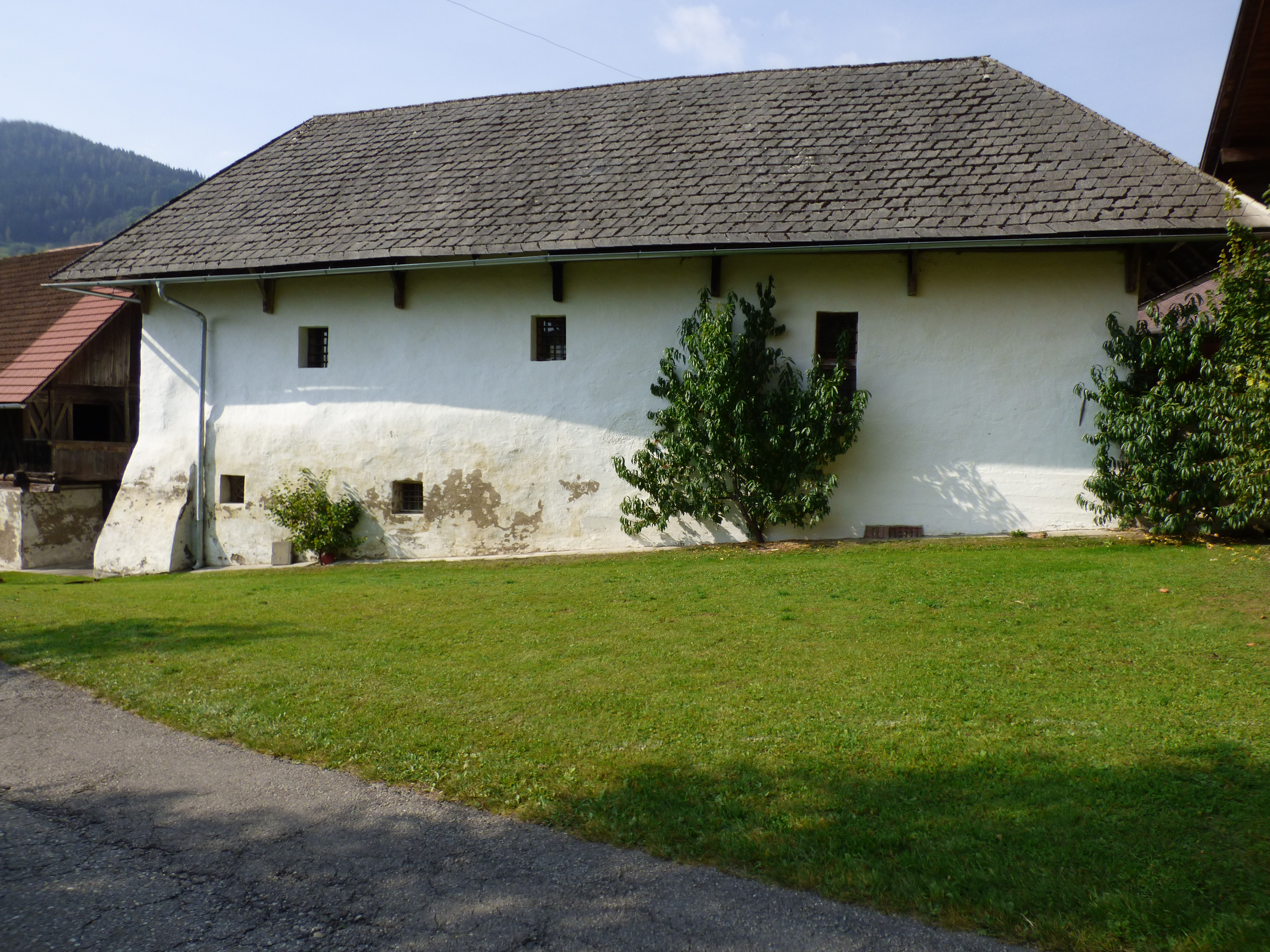 Staudachhof, Gut Weilern (Gemeinde Friesach): denkmalgeschütztes Haus Nr. 9, Ansicht von Osten